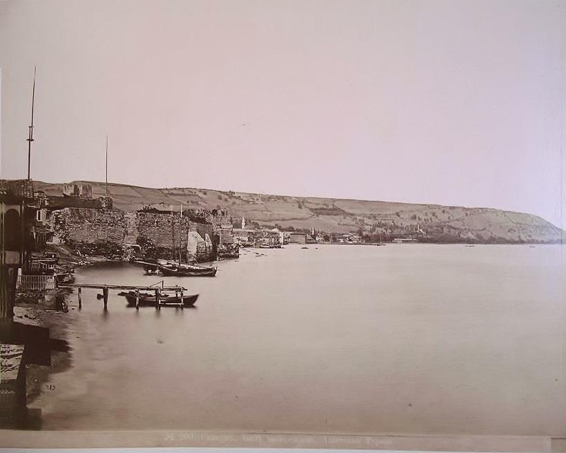 Günümüzde Cumhuriyet Meydanı'nın bulunduğu yerden çekilen bir fotoğraf. Samsun Kalesi'nin denize sıfır duvarları açıkça görünüyor.